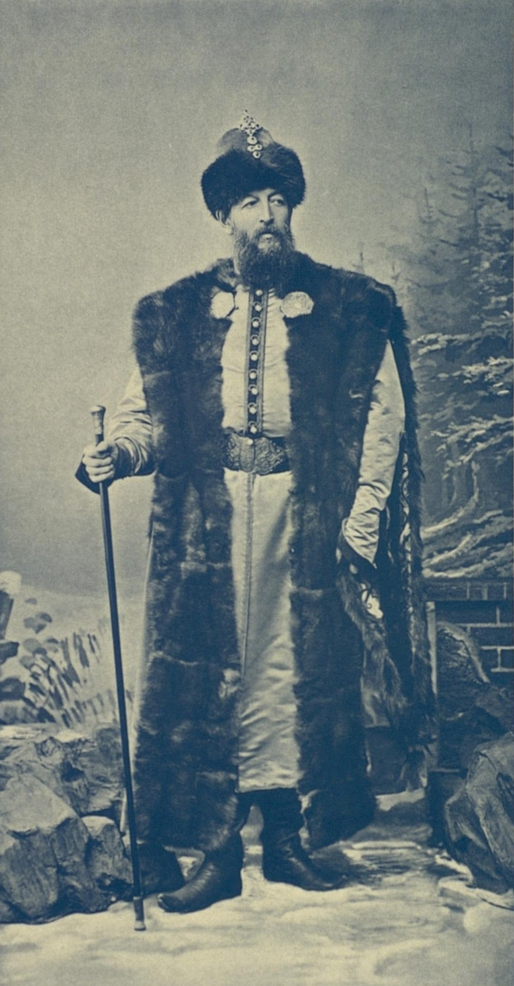 Шталмейстер, Князь Борис Борисович Мещерский, в одеяниях Русского Боярина 17 века, по рисунку "Посол Князь Репнин"